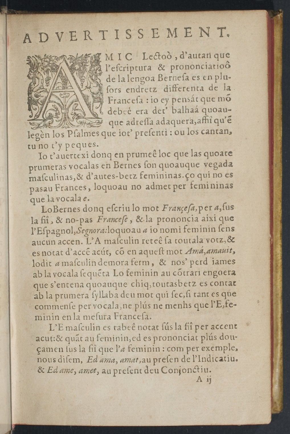 Arnaud de Salette explique la prononciation du béarnais dans ses Psaumes de 1583.